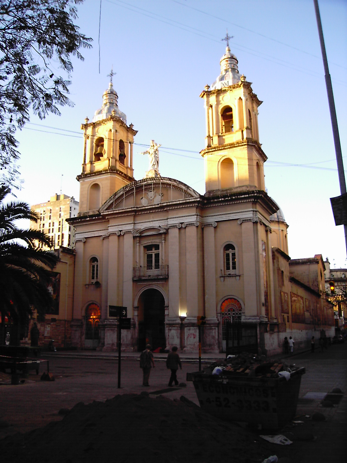 Iglesia en Córdoba, Argentina